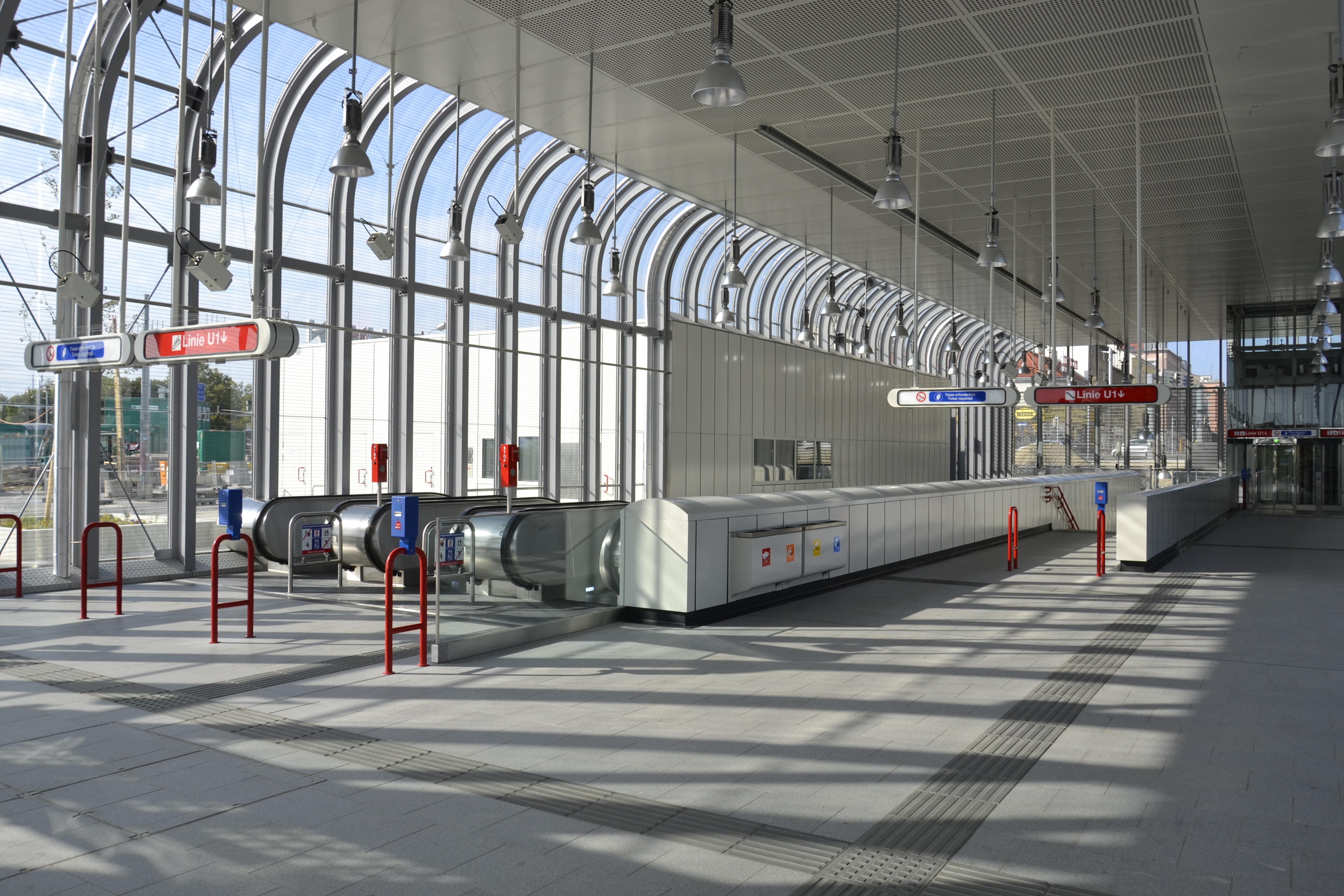 Die U-Bahn-Station Altes Landgut ist eine U-Bahn-Station der U-Bahn-Linie U1 in Wien. Auf dieser Aufnahme ist das Aufnahmegebäude Verteilerkreis Anfang Oktober 2017, knapp einen Monat nach der Eröffnung, zu sehen.